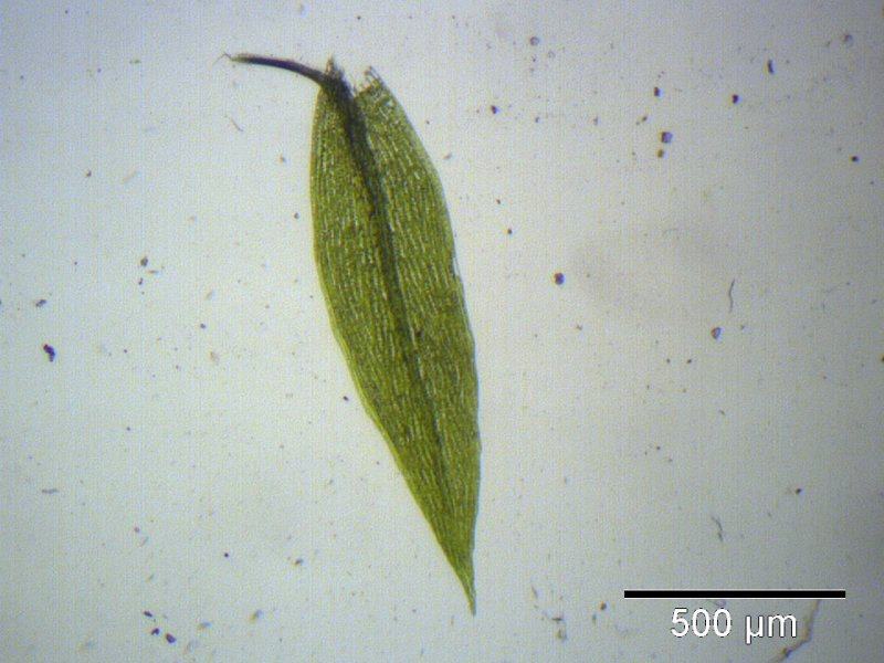 Kreiselfrüchtiges Birnmoos (Bryum turbinatum), Blatt, 40x vergrößert